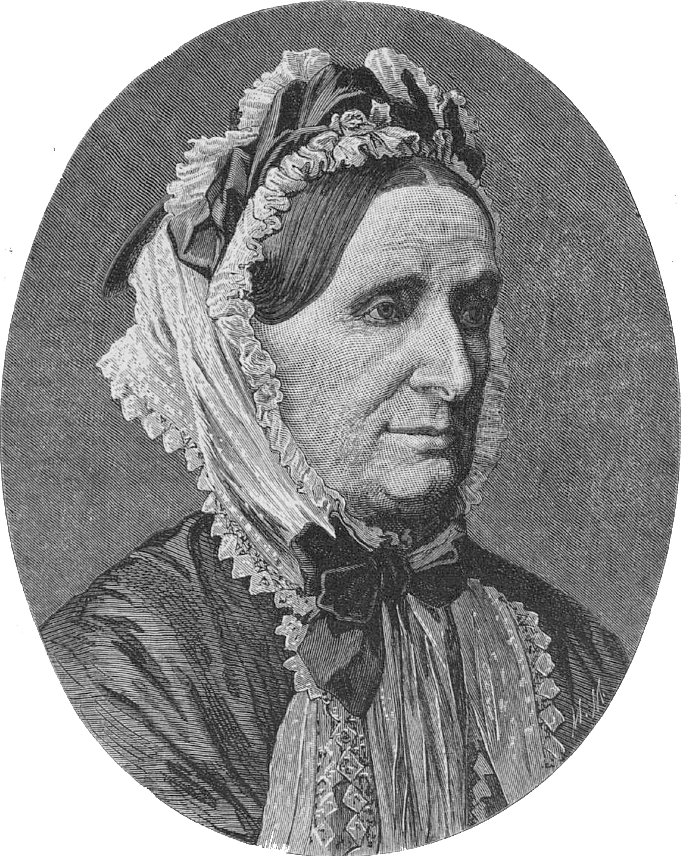 Актриса Каролина Альбрехт.